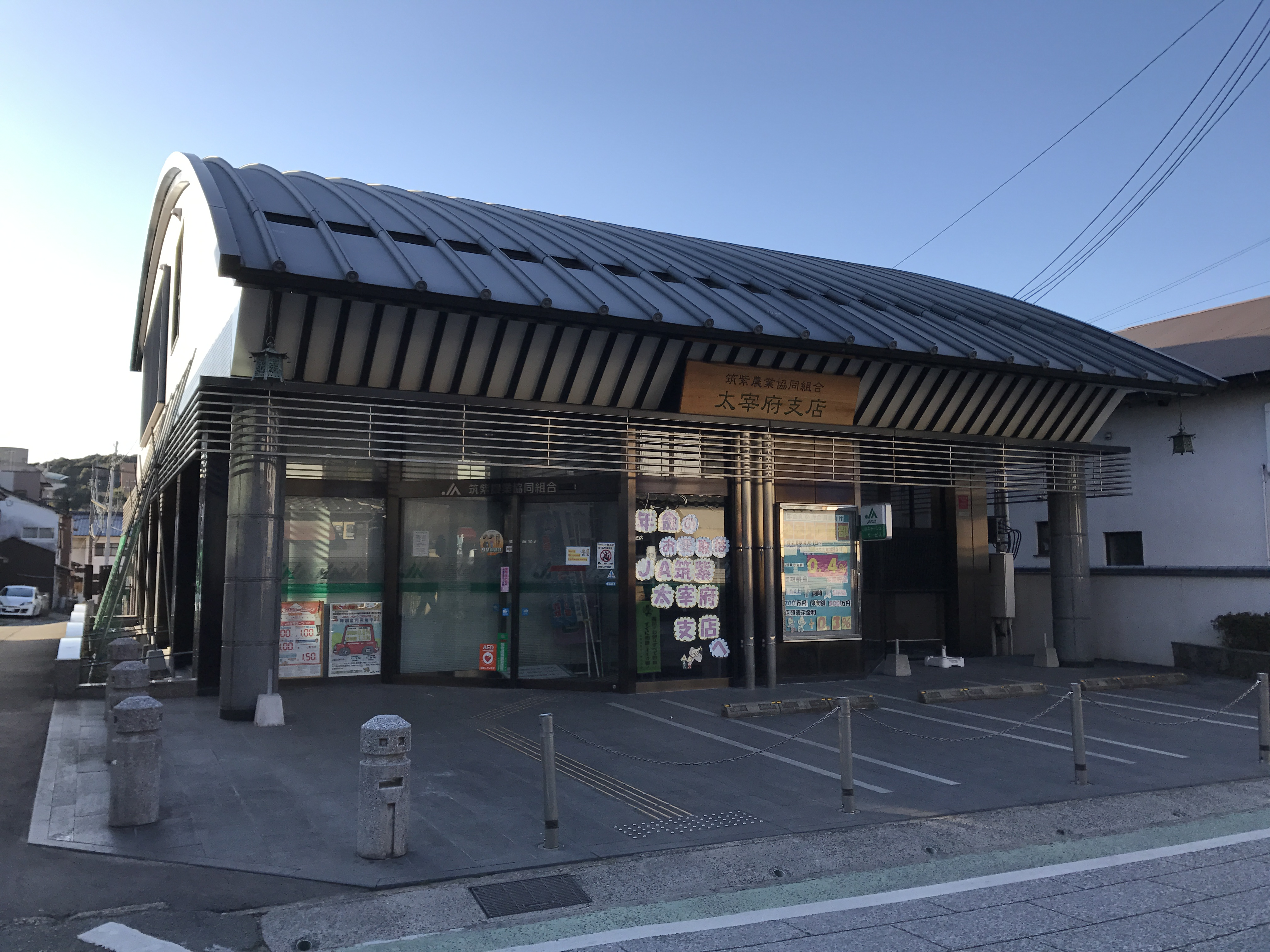 JA筑紫太宰府支店